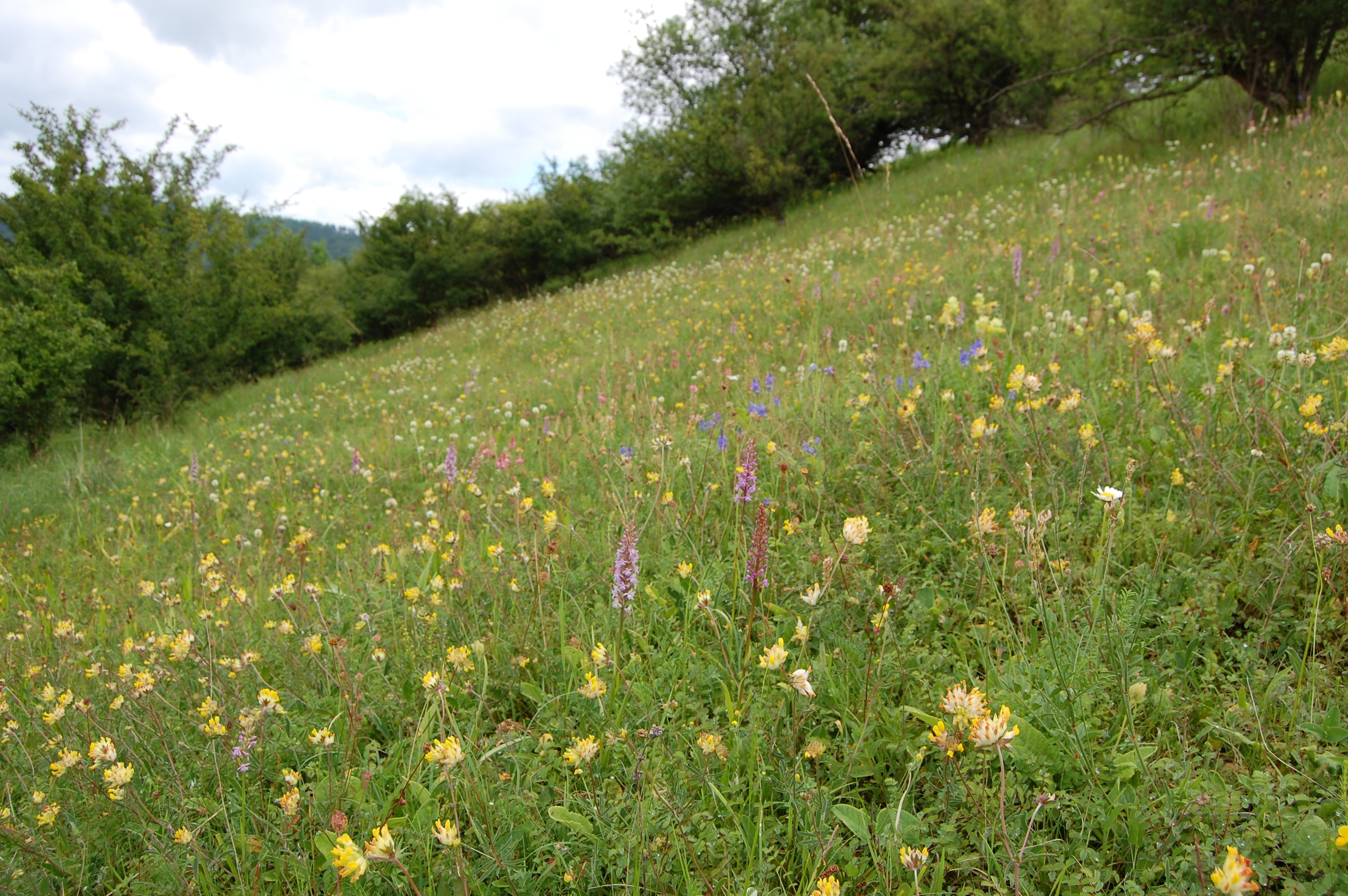 blütenreicher Kalkmagerrasen am Walberg bei Walburg (Werra-Meißner-Kreis, Nordhessen), mit Gymnadenia conopsea, Anthyllis vulneraria, Veronica teucrium, Onobrychis viciifolia u.a.